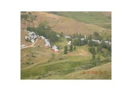 Büyükdere mahallesinden bir görünüm